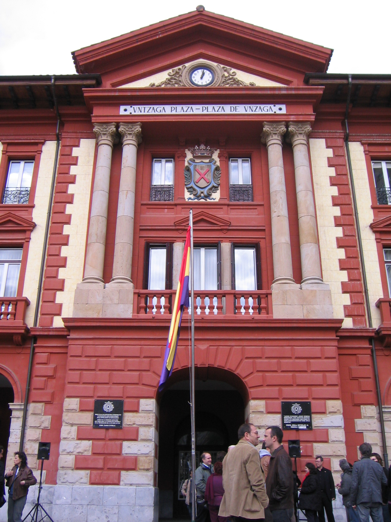 Izado de la bandera republicana en Eibar (Guipuzcoa, España). Conmemoración del 77º aniversario de la proclamación de la Segunda República en España.